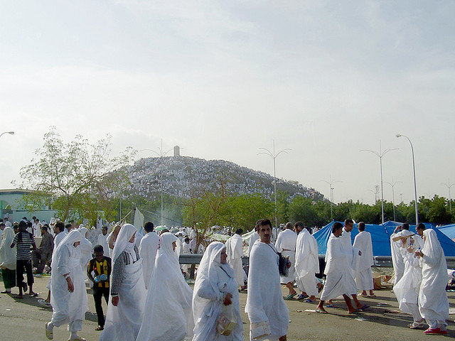 Hajj 2005